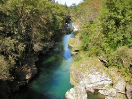 Die Erlaufschlucht in Purgstall an der Erlauf NÖ